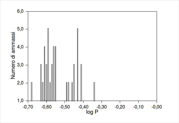 Distribuzione dei logaritmi dei periodi delle RR Lyrae di tipo RRab per gli ammassi galattici